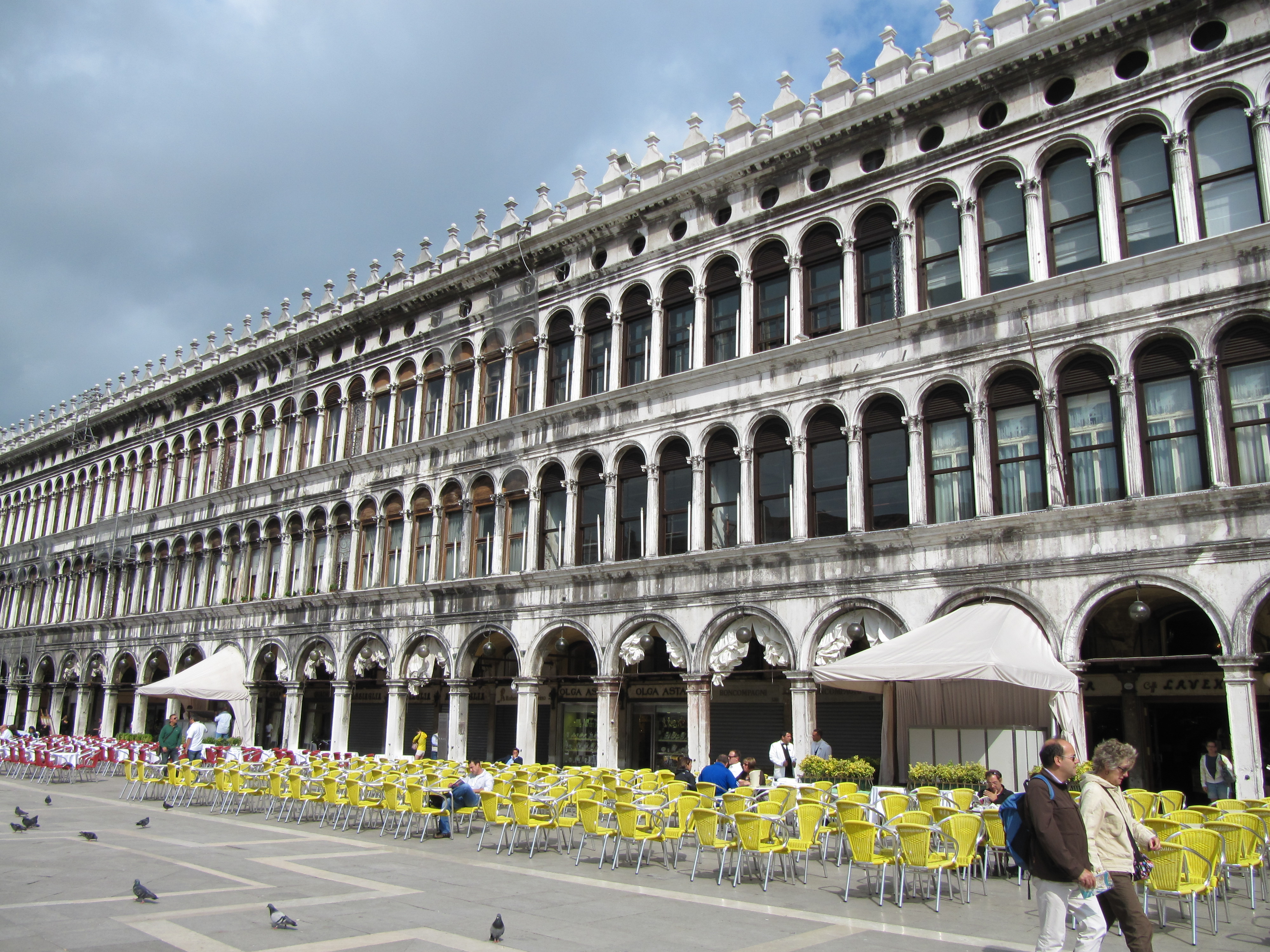 Europe